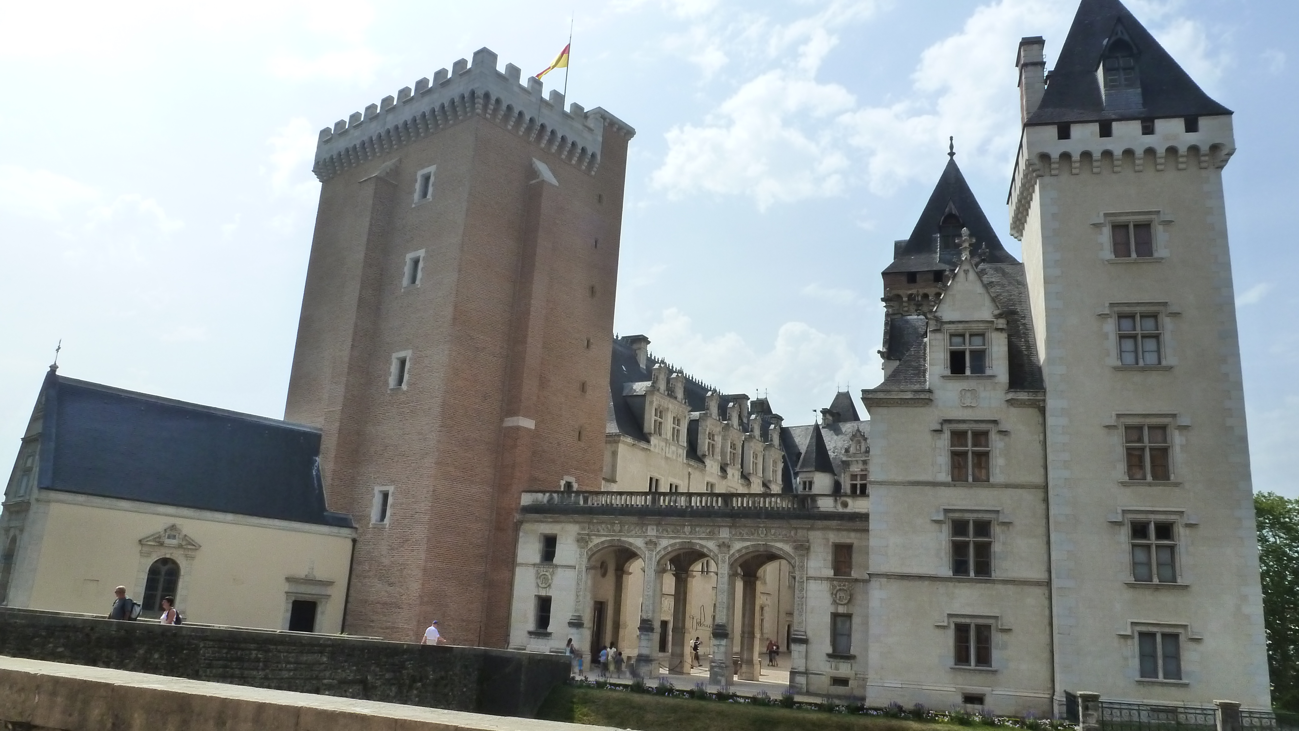 Château de Pau après Rénovation